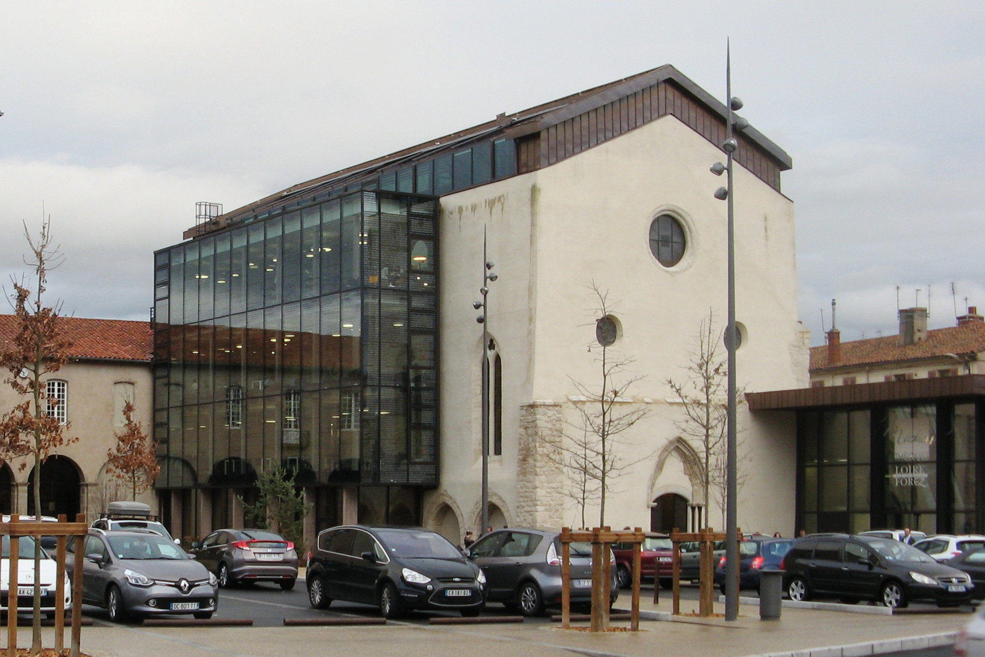 Montbrison, médiathèque départementale de la Loire